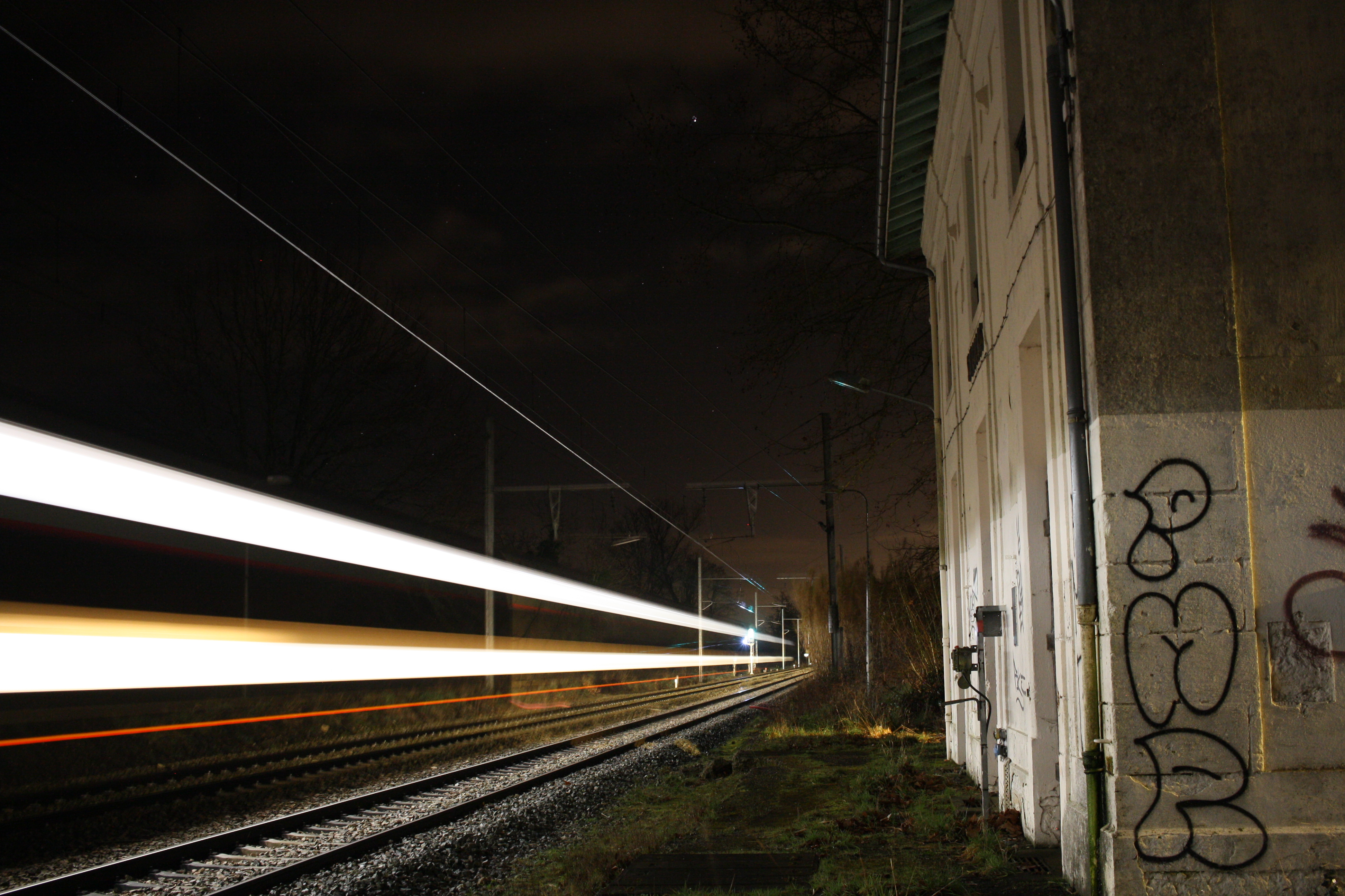 Gare de St-Nicolas - St-Romain la nuit au passage d'un TGV.